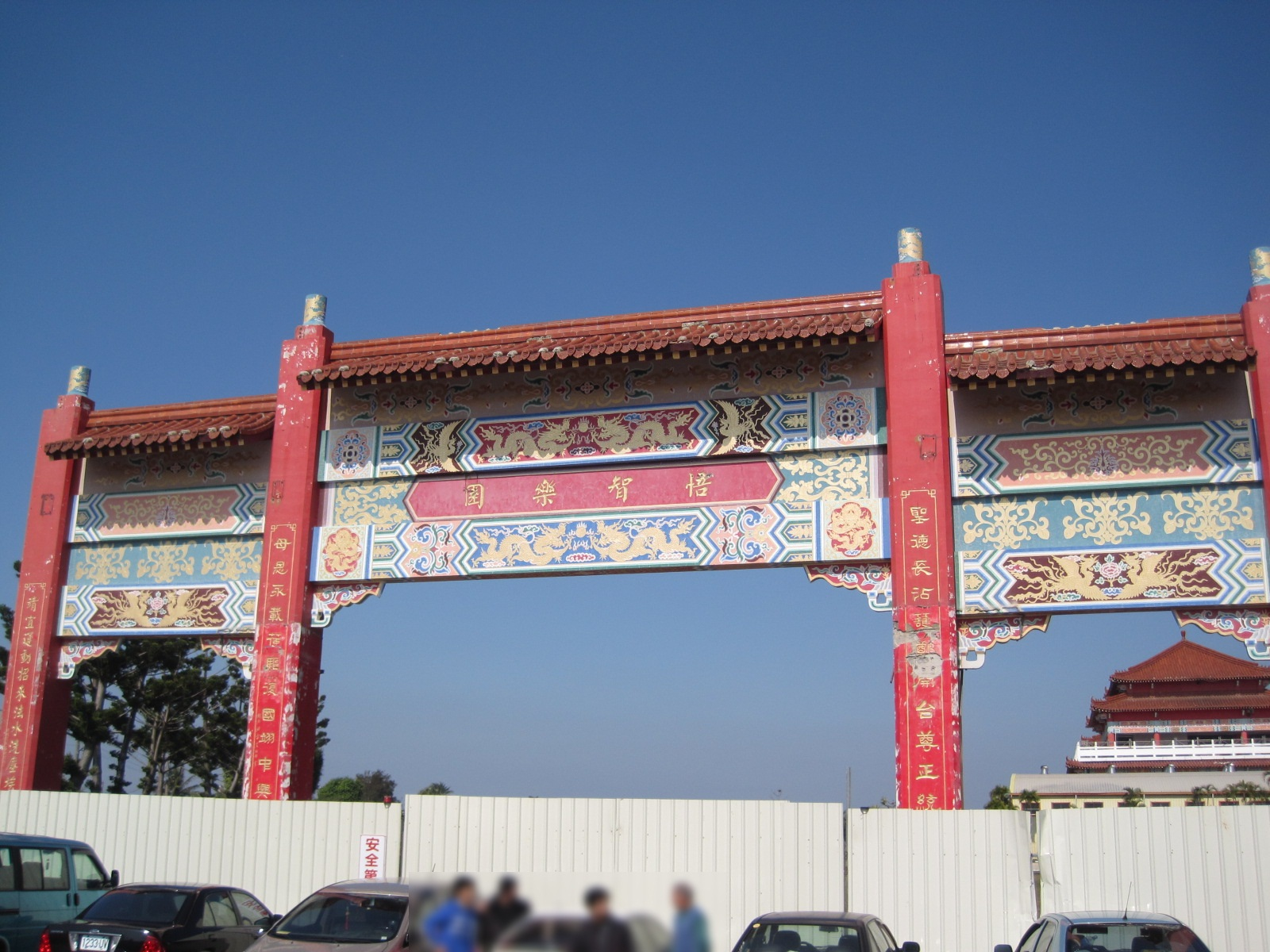 悟智樂園僅剩的牌坊